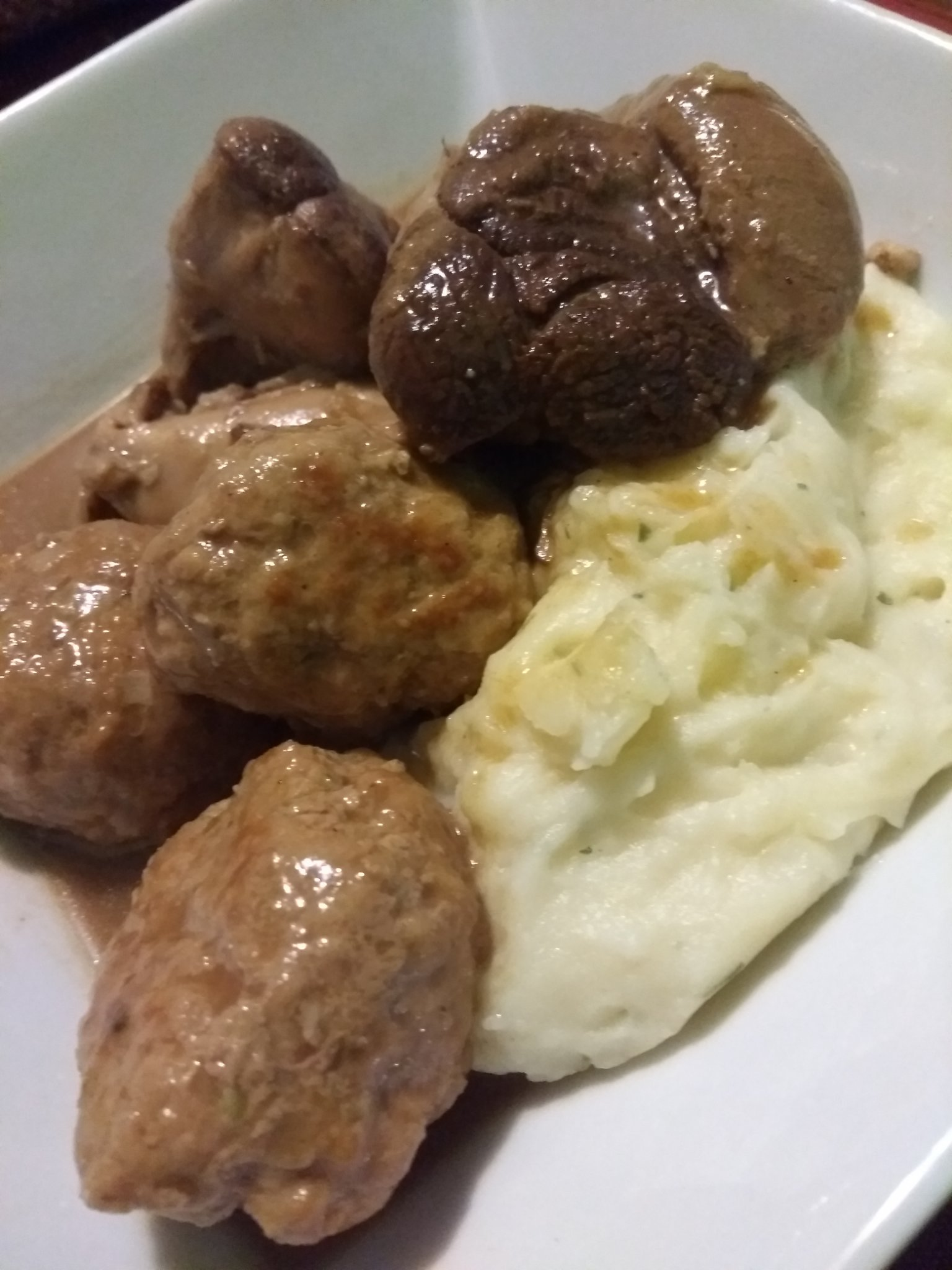 Plat de ragoût de boulettes et pattes de cochons, accompagnés d'une purée de pomme de terre